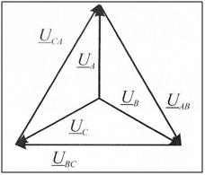 Faasi- ja liinipingete vektordiagramm